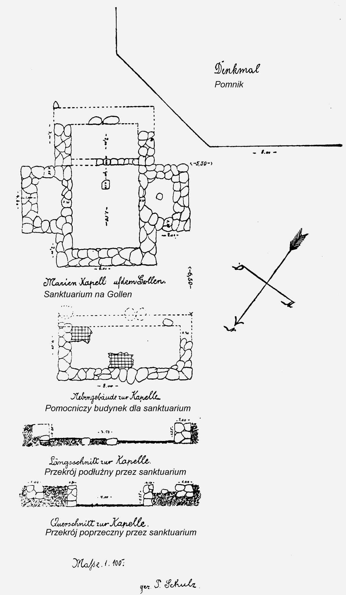 Szkic po wykopaliskach arch.